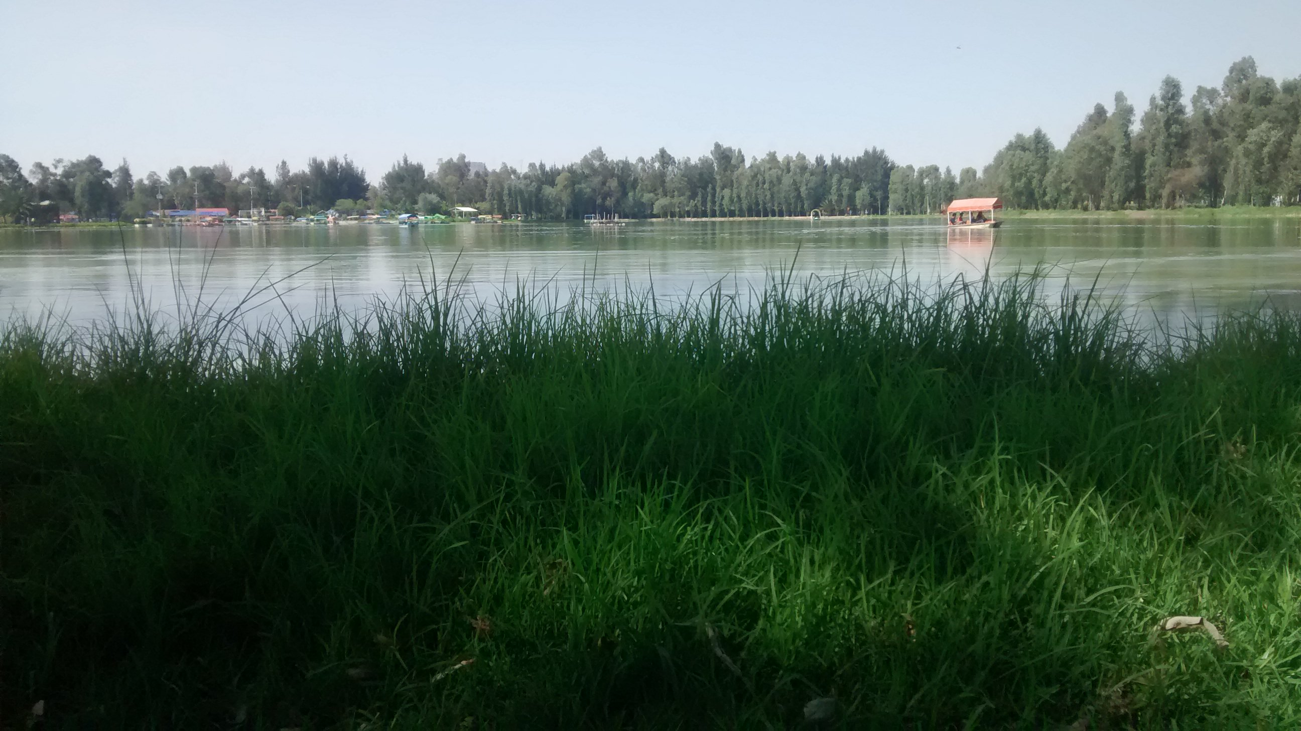 Ubicado en el Bosque de Tláhuac